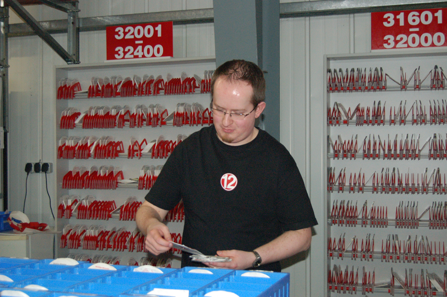 Neue Sendungen werden beim DVD-Verleih zusammengestellt